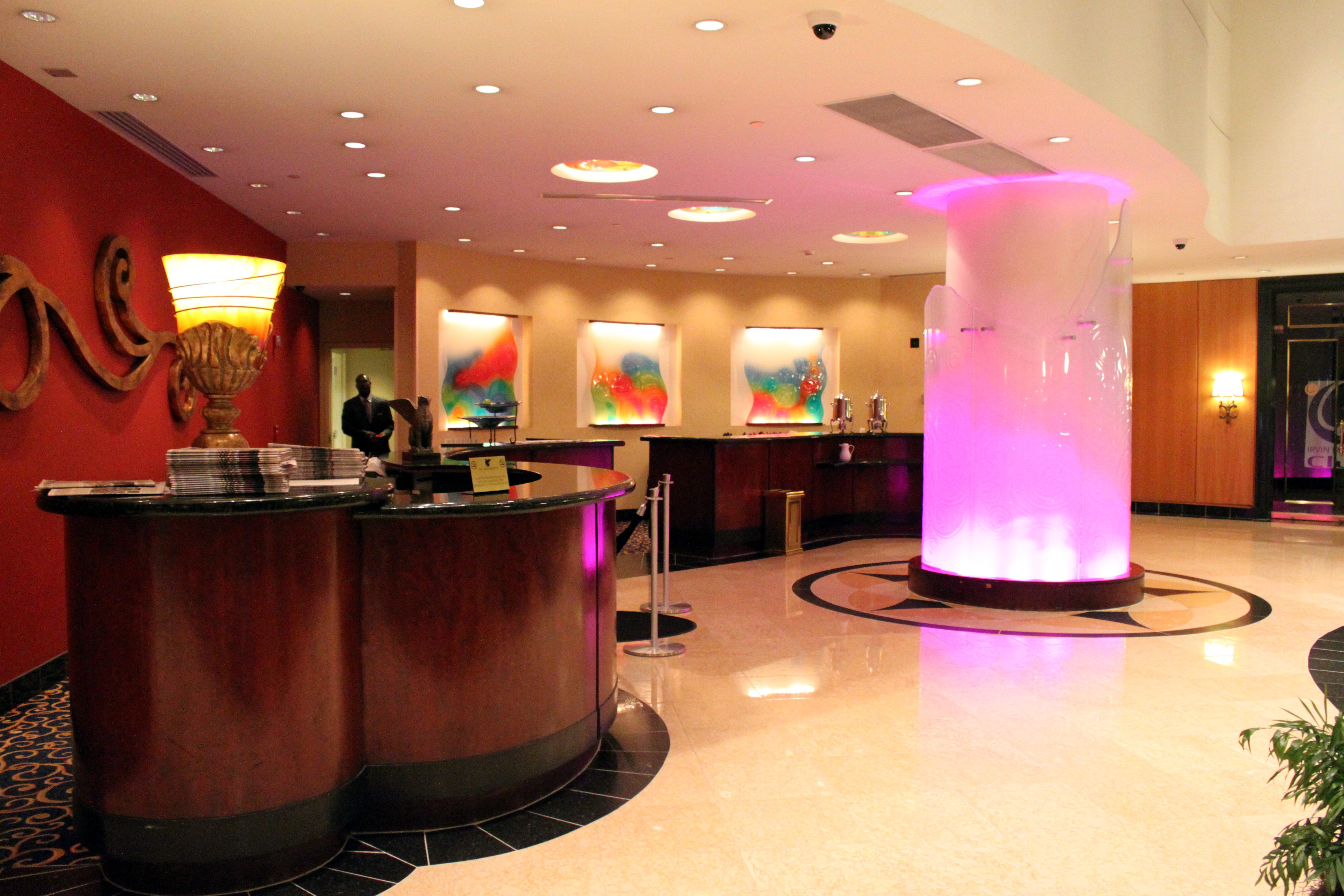 Hotel Front Desk - JW Marriott Hotel ~ New Orleans, Louisiana